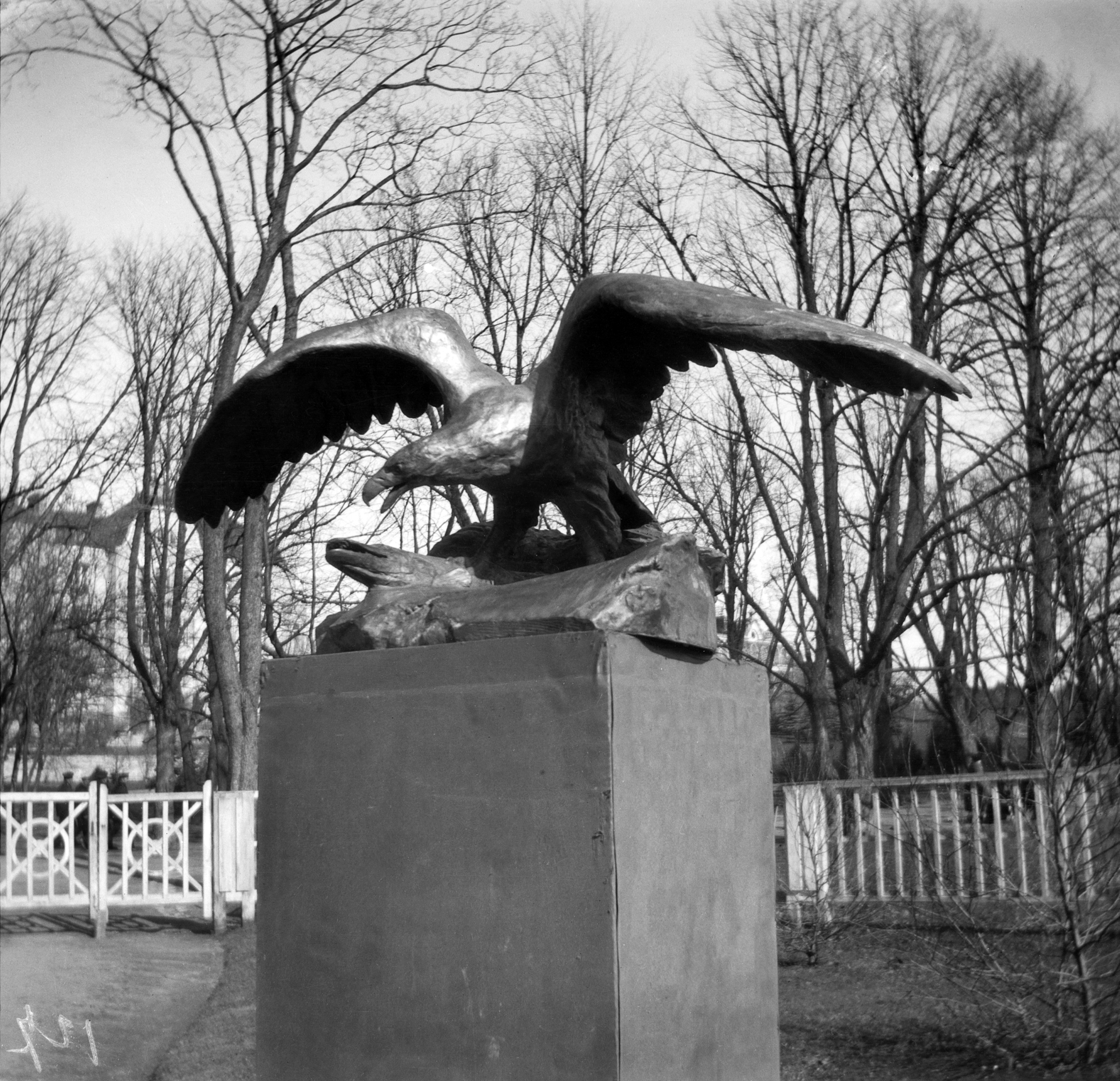 Kuvanveistäjä Evert Saarnion veistos Kotka ja hauki. Ollut tilapäisesti näytteillä Kaivopuistossa. -- negatiivi, nitraatti, mv